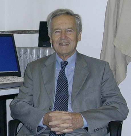 Portrait Maurizio_Cumo